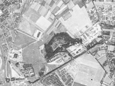 Fort VI Twierdzy Poznań sfotografowany przez satelitę KH-4A 1023, 23 sierpnia 1965 r.